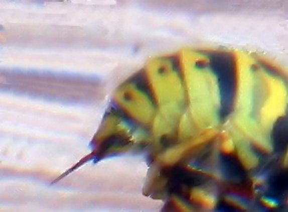 zelfgemaakte foto van de angel van de Gewone wesp; eind juli